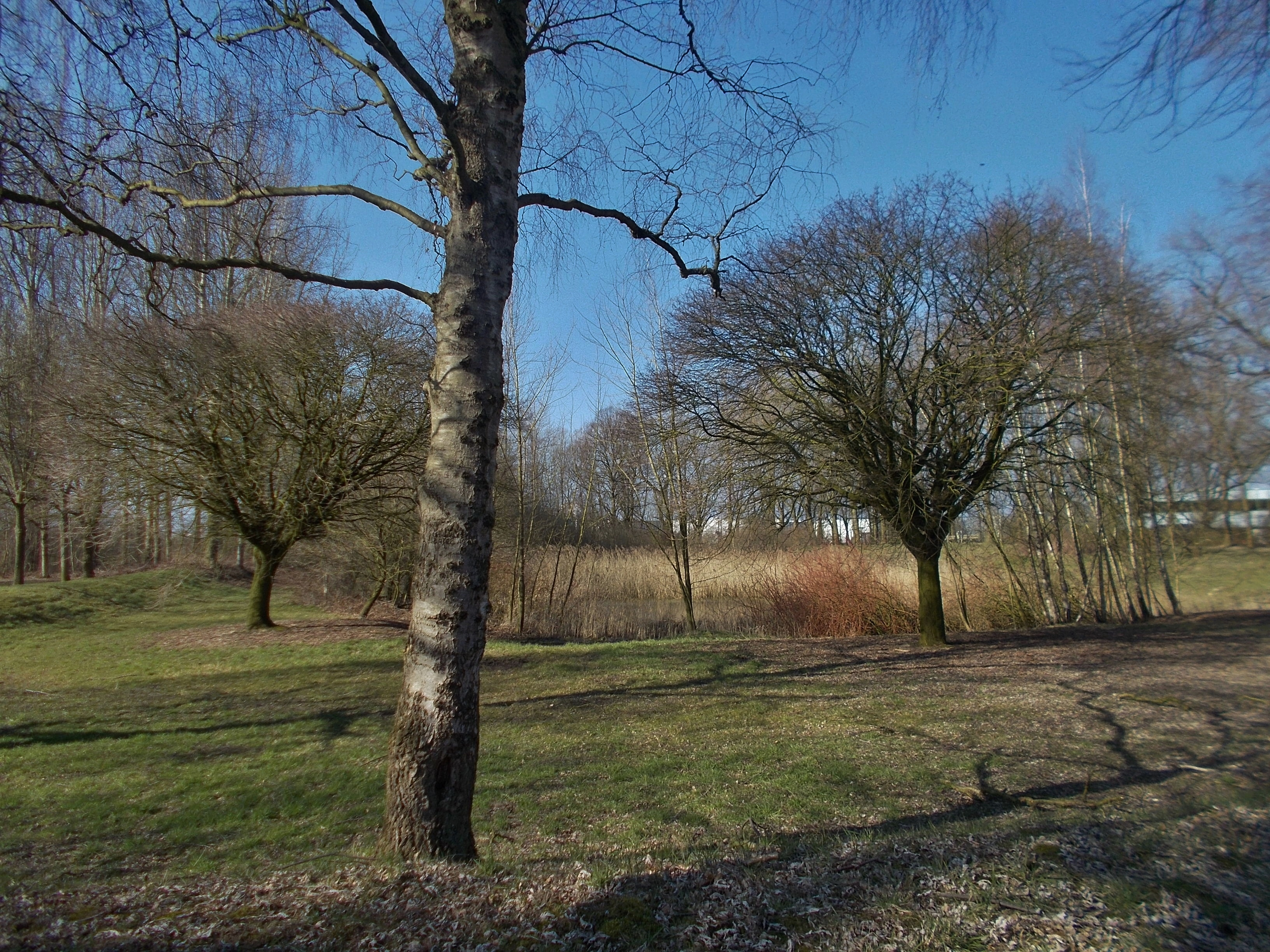 Gemeentelijk natuurparkje op industrieterrein Kloosterlanden te Deventer. De locatie is een voormalig openluchtzwembad aan de Schipbeek dat rond 1960 gesloten werd tbv de aanleg van het industrieterrein. Vanwege de lage ligging is het onbebouwd gebleven.